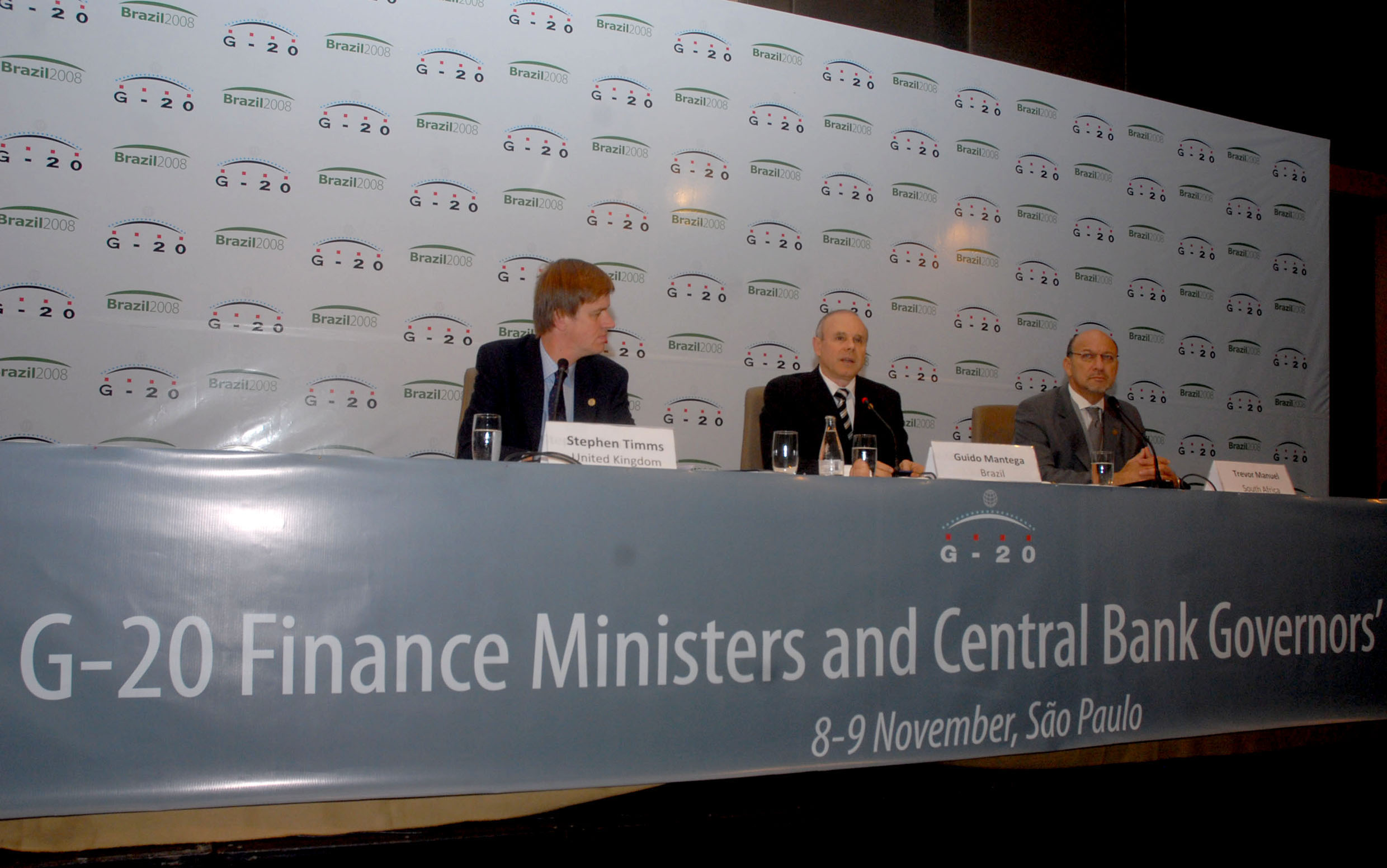 O secretário de Finanças do Tesouro do Reino Unido, Stephen Timms, o ministro da Fazenda, Guido Mantega, e o ministro das Finanças da África do Sul, Trevor Manuel, durante entrevista coletiva sobre a reunião do G20, que engloba as maiores economias do mundo